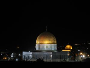 Kupola nad Stijenom